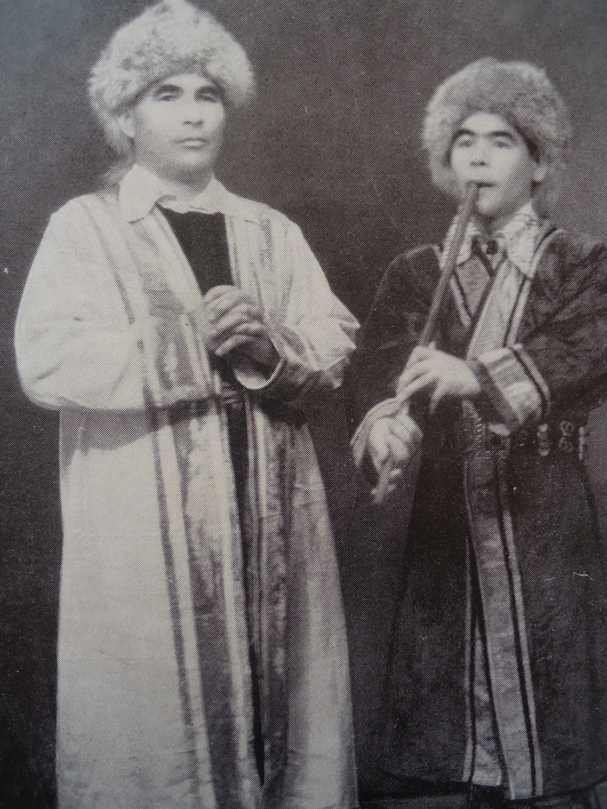 Башҡортса: Йырсы Хәбир Ғәлимов һәм ҡурайсы-бейеүсе Йәнғәли Вәхитов